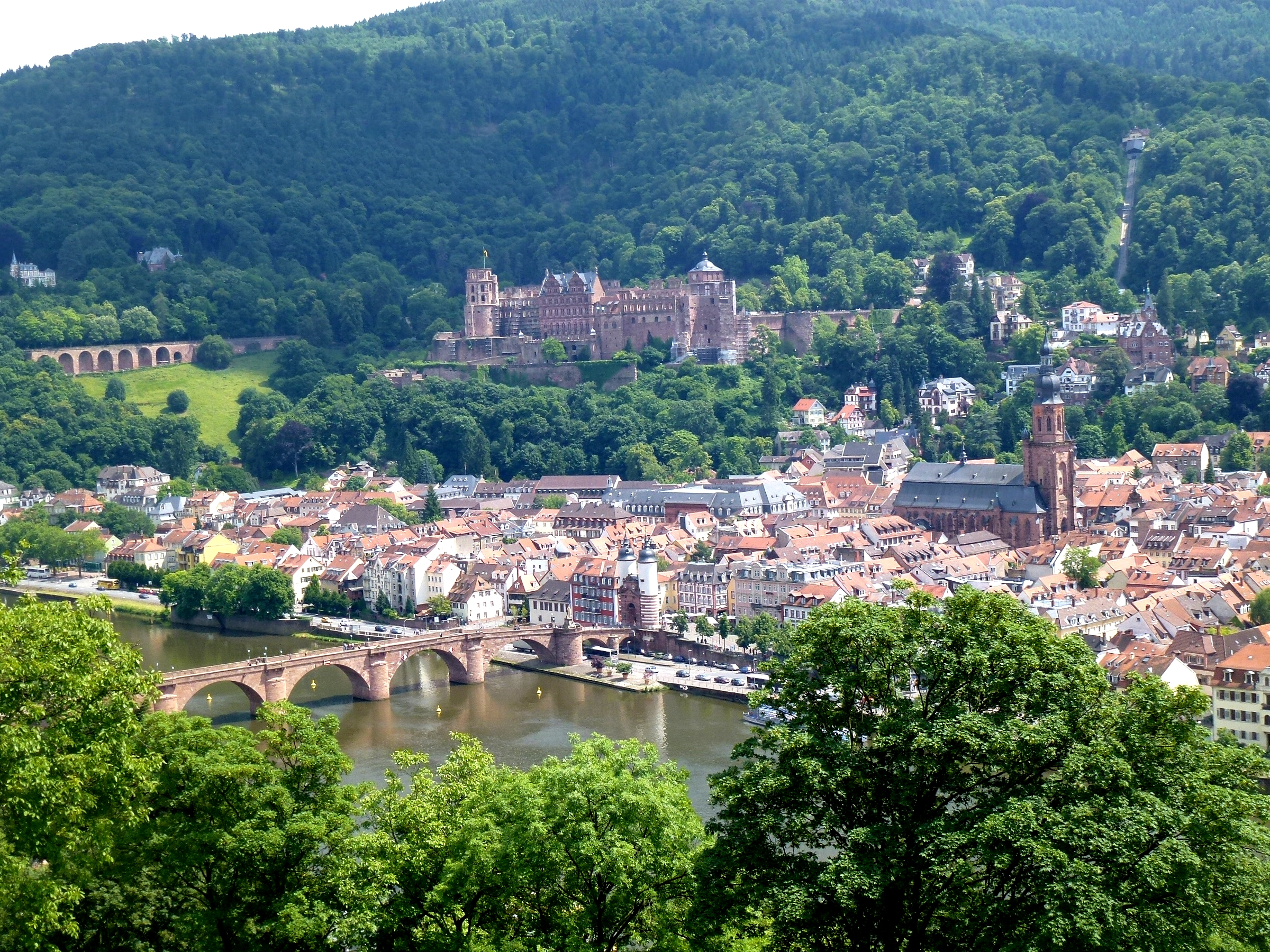 Philosophenweg Heidelberg Germany